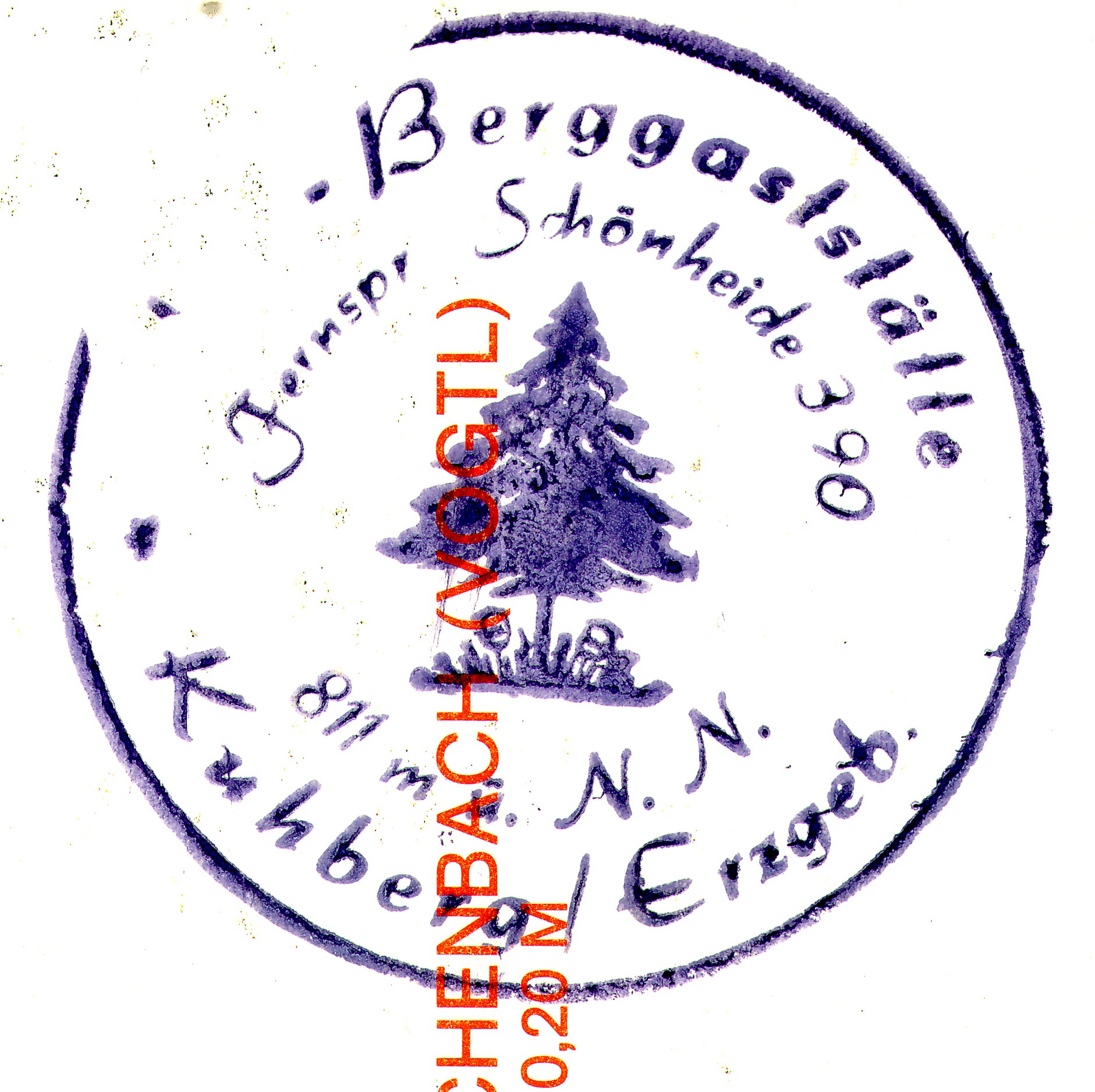 Kuhberg (Stützengrün): Stempel der auf dem Berg gelegenen Gaststätte auf einer Ansichtskarte. Der Stempel datiert aus der Zeit nach 1989: Das „HO“ (für die DDR-staatliche Handelsorganisation = HO) auf dem Stempel ist entfernt. Die Treuhandanstalt (oder ein anderer Rechteinhaber) hatte die Gasstätte schon an einen privaten Betreiber verpachtet. Unzutreffend ist auf dem Stempel die Höhenangabe mit „811 m ü. N. N.“. Diese Höhe erreichte nur, wer den Turm in seiner alten Höhe vor dem Aufmauern eines neuen Turmstückes bestieg. Der Preis der Ansichtskarte ist erkennbar: "0,20 M". Ob der Gaststättenbetreiber ihn schon angehoben hatte? Eine Preisbindung gab es nicht mehr oder wurde nicht beachtet. Die Telefon-Nummer verweist auf Schönheide im Erzgebirge, zu dem der Berg auch früher gerechnet wurde.